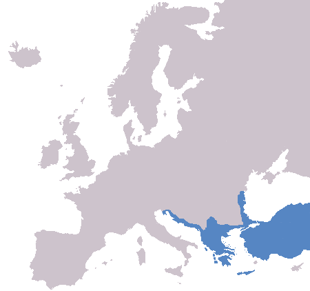 en-occurence of Lacerta trilineata pl- występowanie jaszczurki trójpręgiej